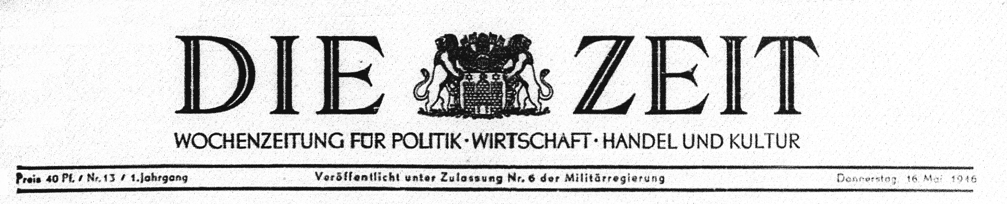 ZEIT-Kopfzeile 1946 - von Nr. 1 bis 18 (21.2. bis 20.6.1946) - mit Czeschkas Hamburg-Wappen